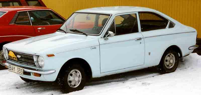 Toyota Corolla 1100 1969